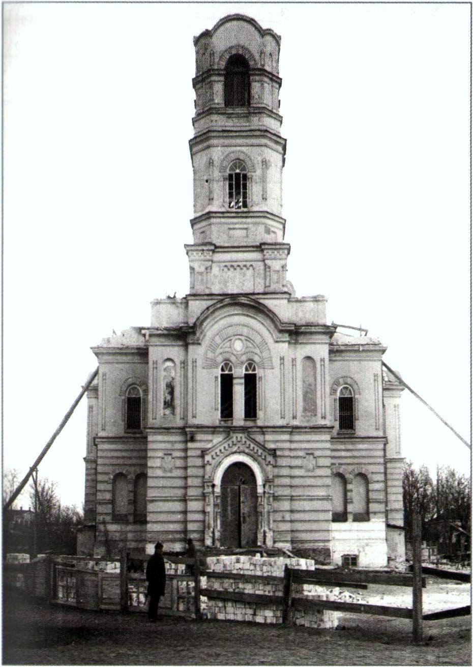 Митрофаниевская церковь. Фотография 1930/х годов.